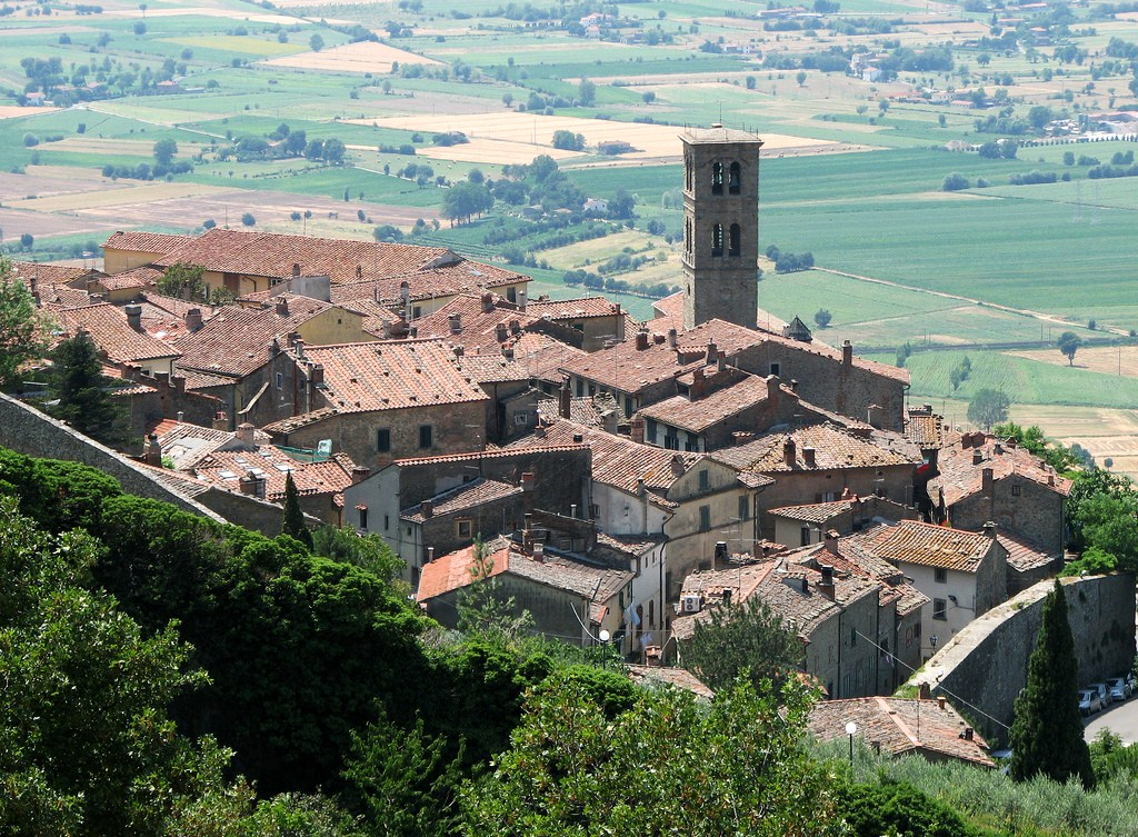 Cortona, Toscana, Italia